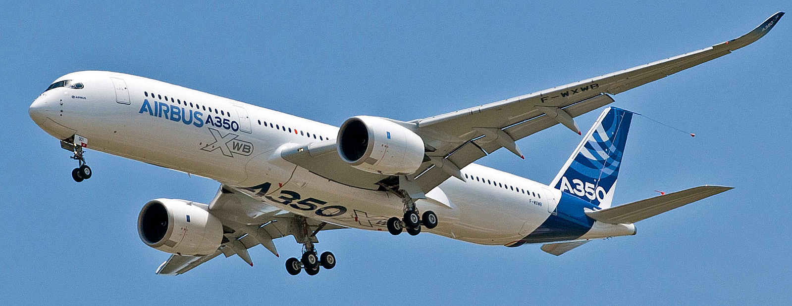 Passage basse altitude du premier exemplaire de l'A350, sur le site Airbus de Toulouse